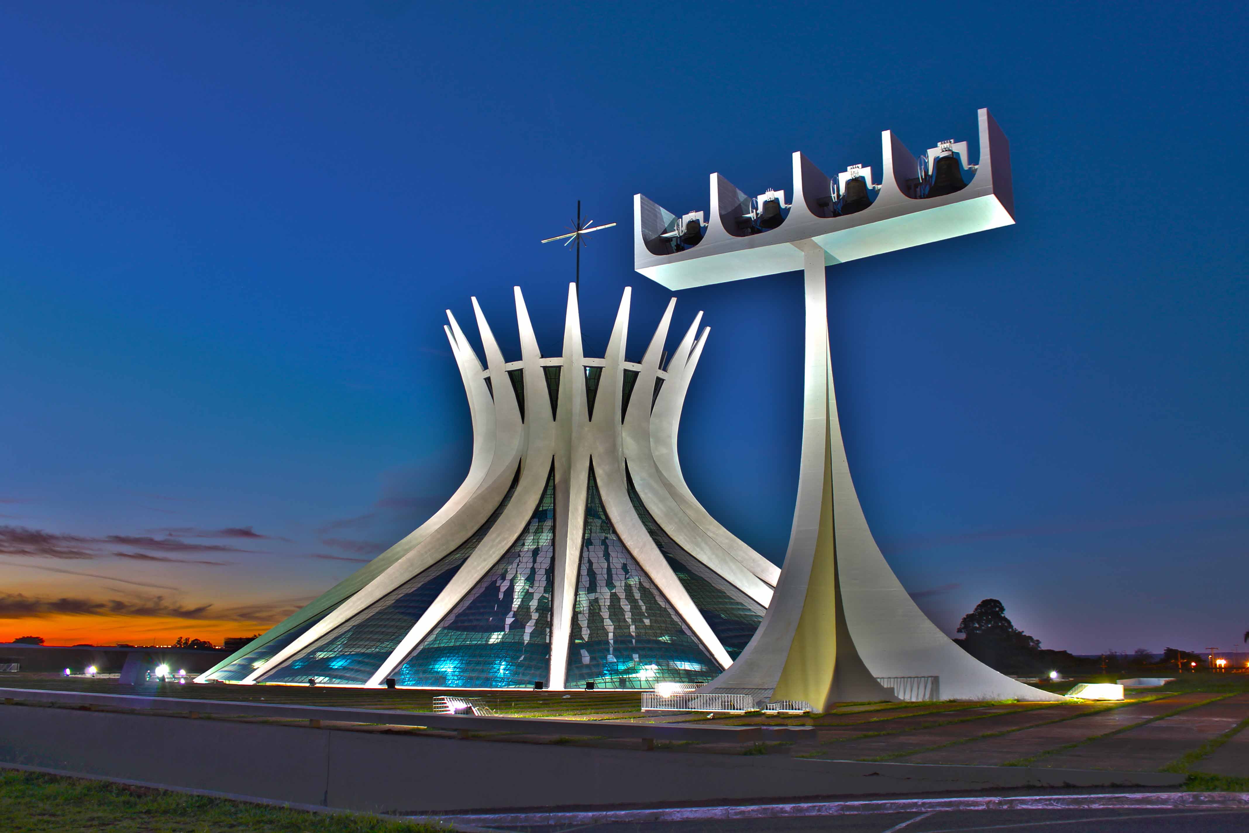 Catedral Metropolitana